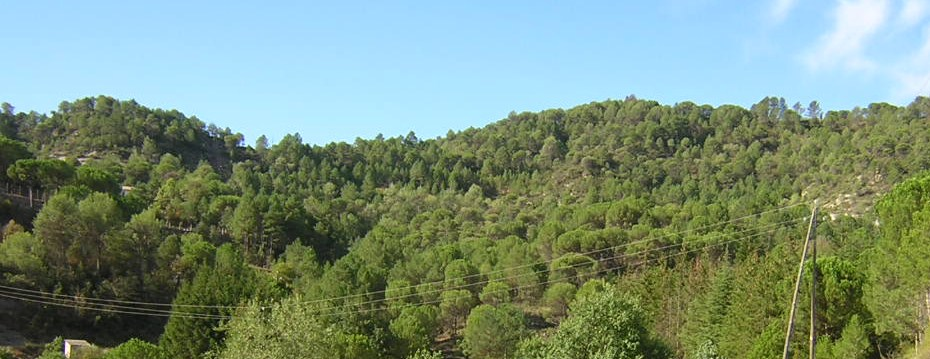 Baga del Coll de Portella (Monistrol de Calders, Moianès)